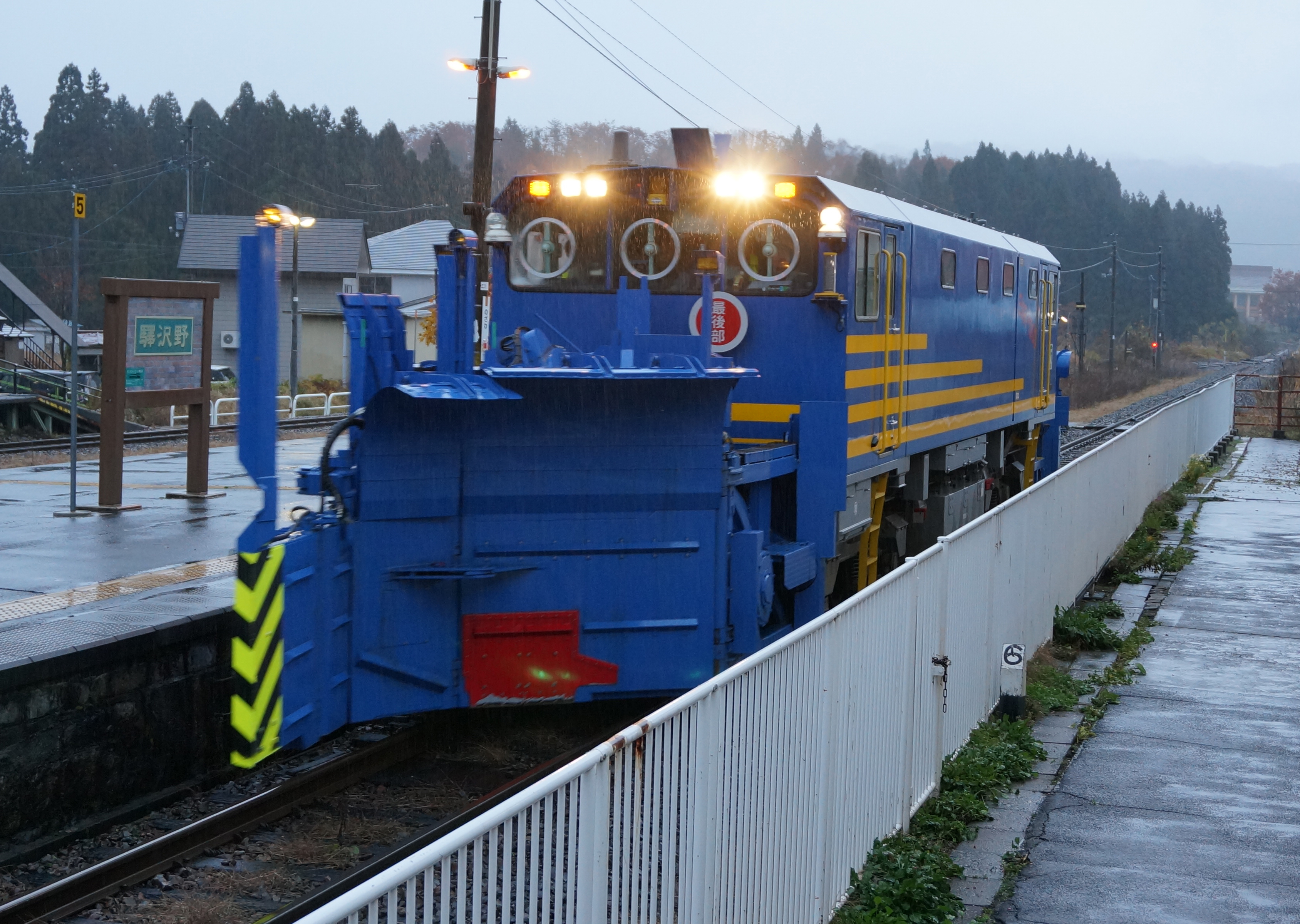 ENR-1000形排雪用モーターカー。野沢駅にて。